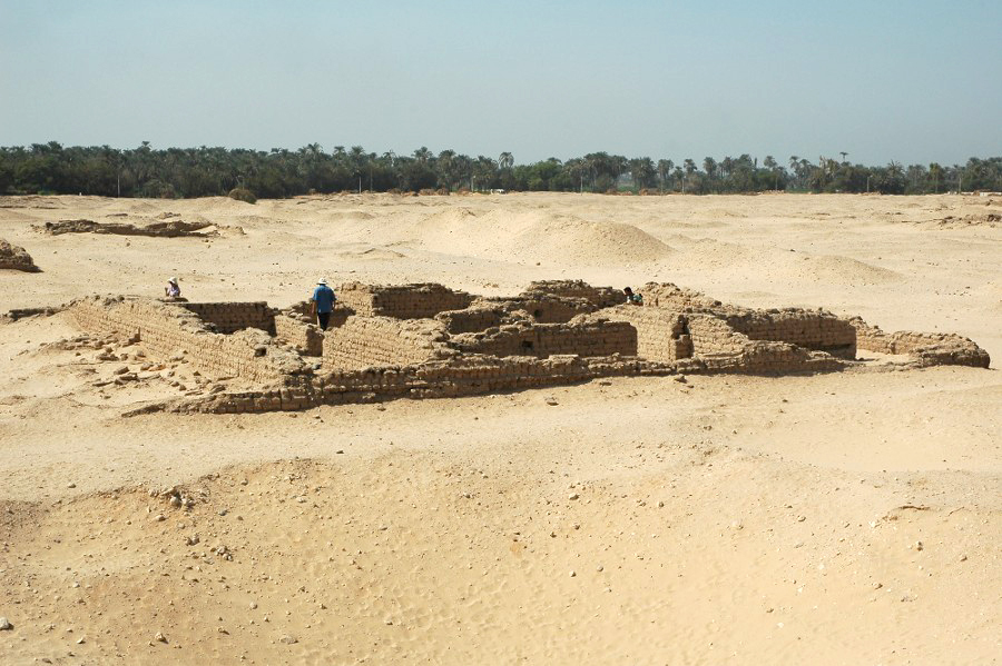 Atelier des Bildhauers Thutmosis (P47,2) in Amarna (Main City), in welchem u.a. die berühmte Büste der Nofretete gefunden wurde